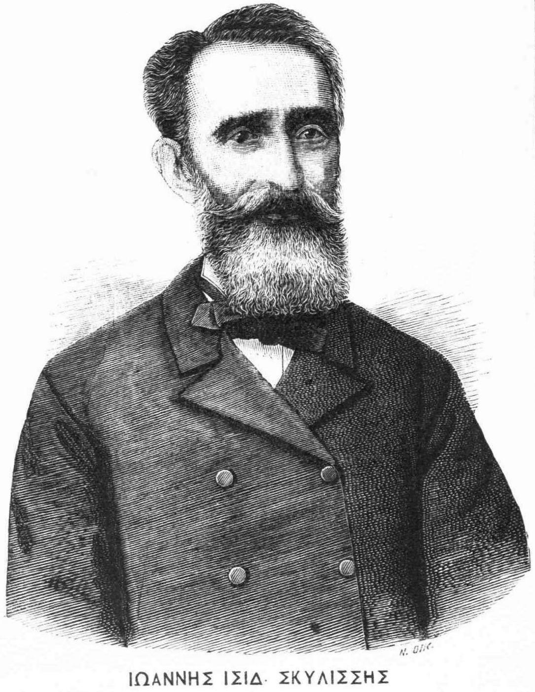 Griechische Persönlichkeit 19. Jahrhundert